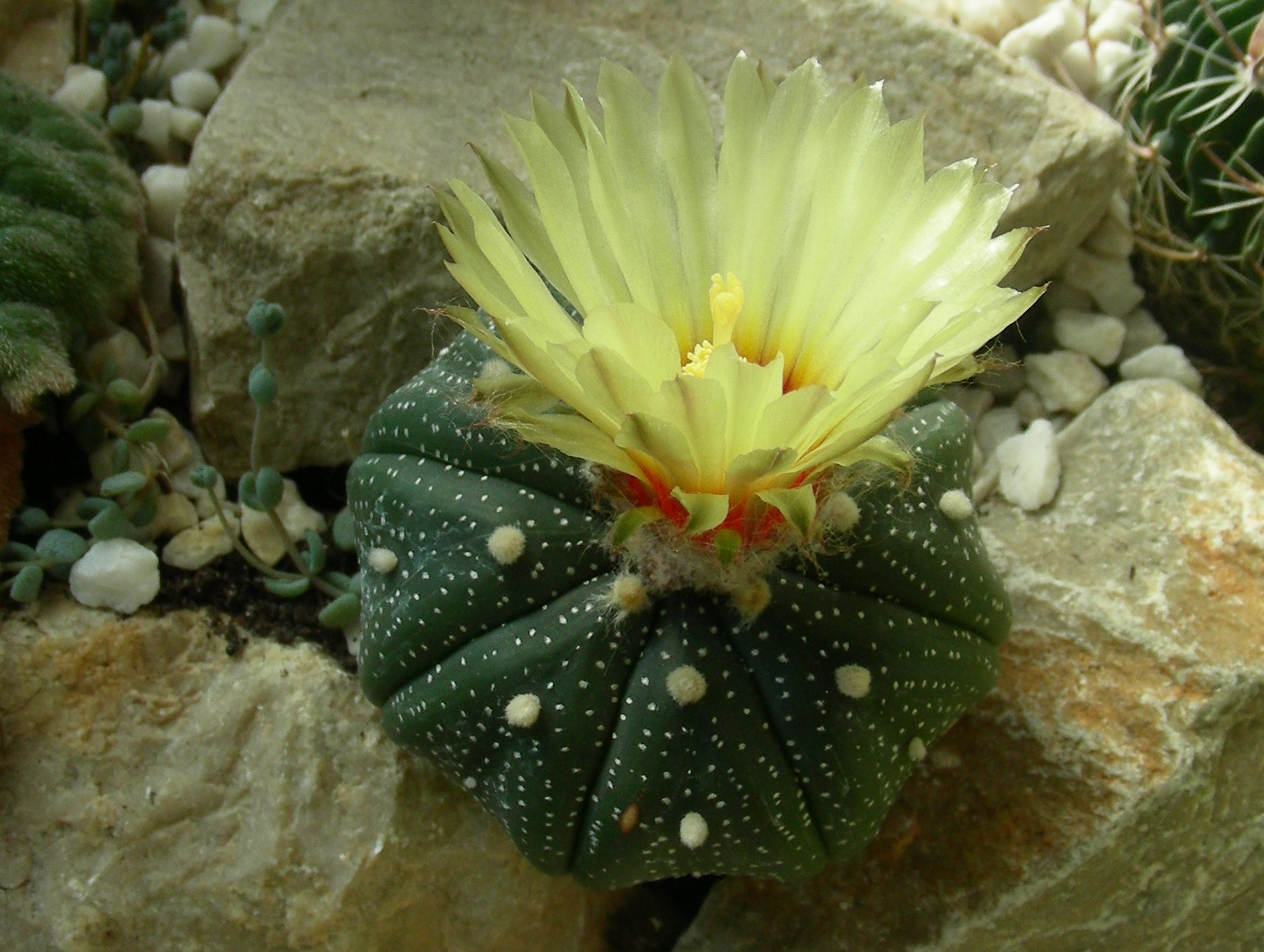 Floraison sur un Astrophytum asterias cultivé en serre.